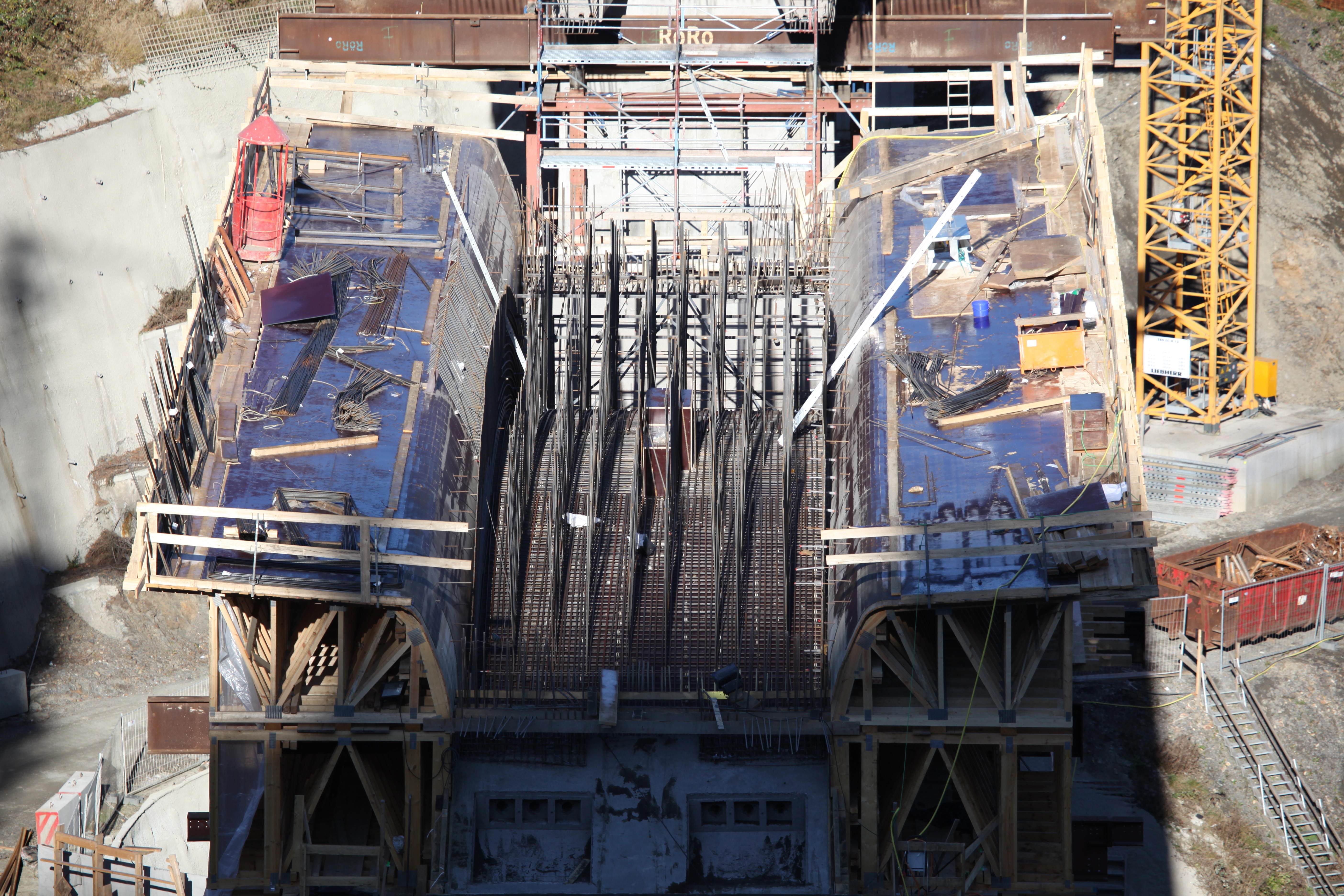 Grubentalbrücke bei Goldisthal, Bewehrung des Bogenscheitels